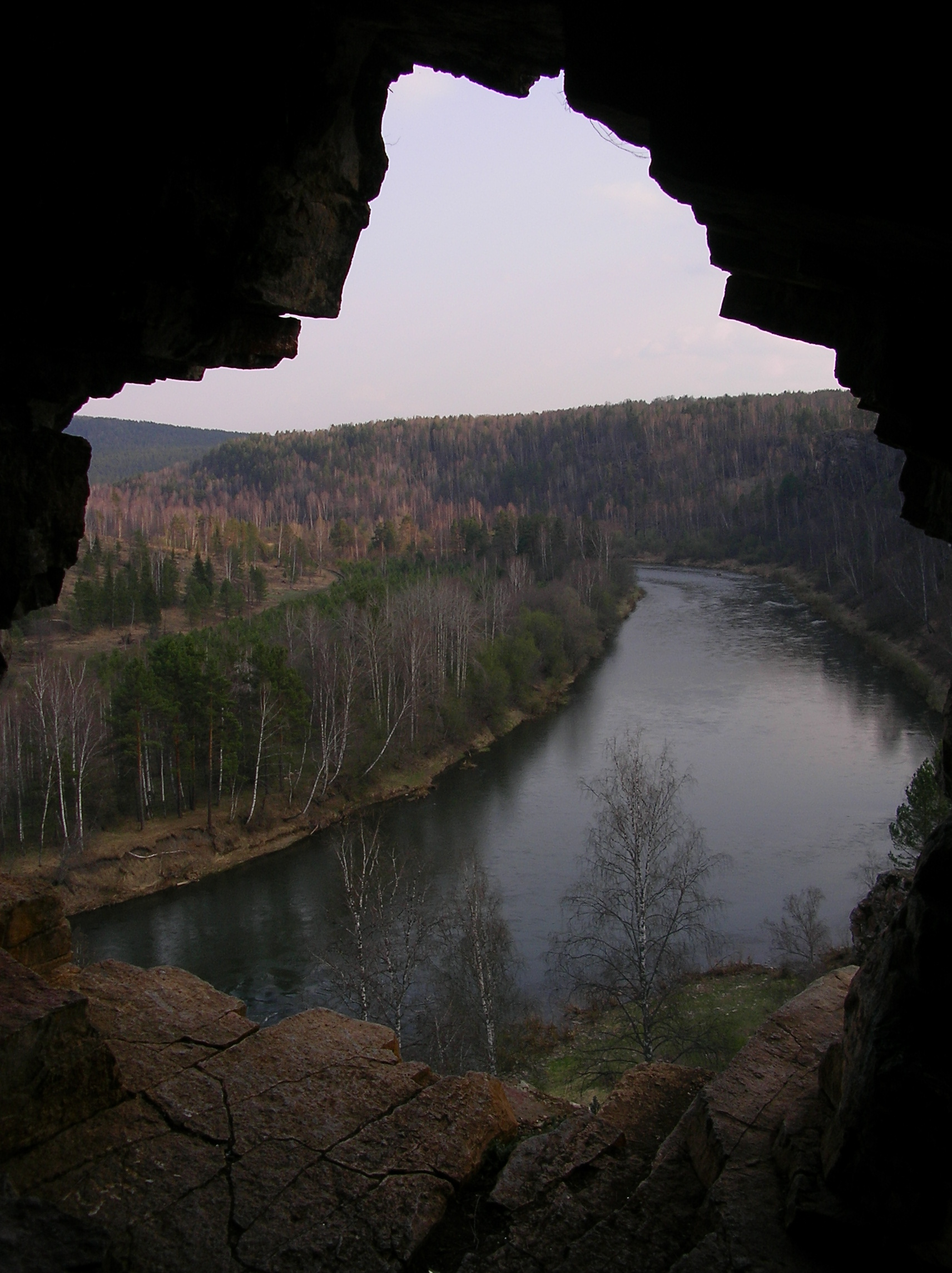 Вид из пещеры Салавата Юлаева на реку Сикася. Башкирия. This image is related to the protected area of Russia number 0210162